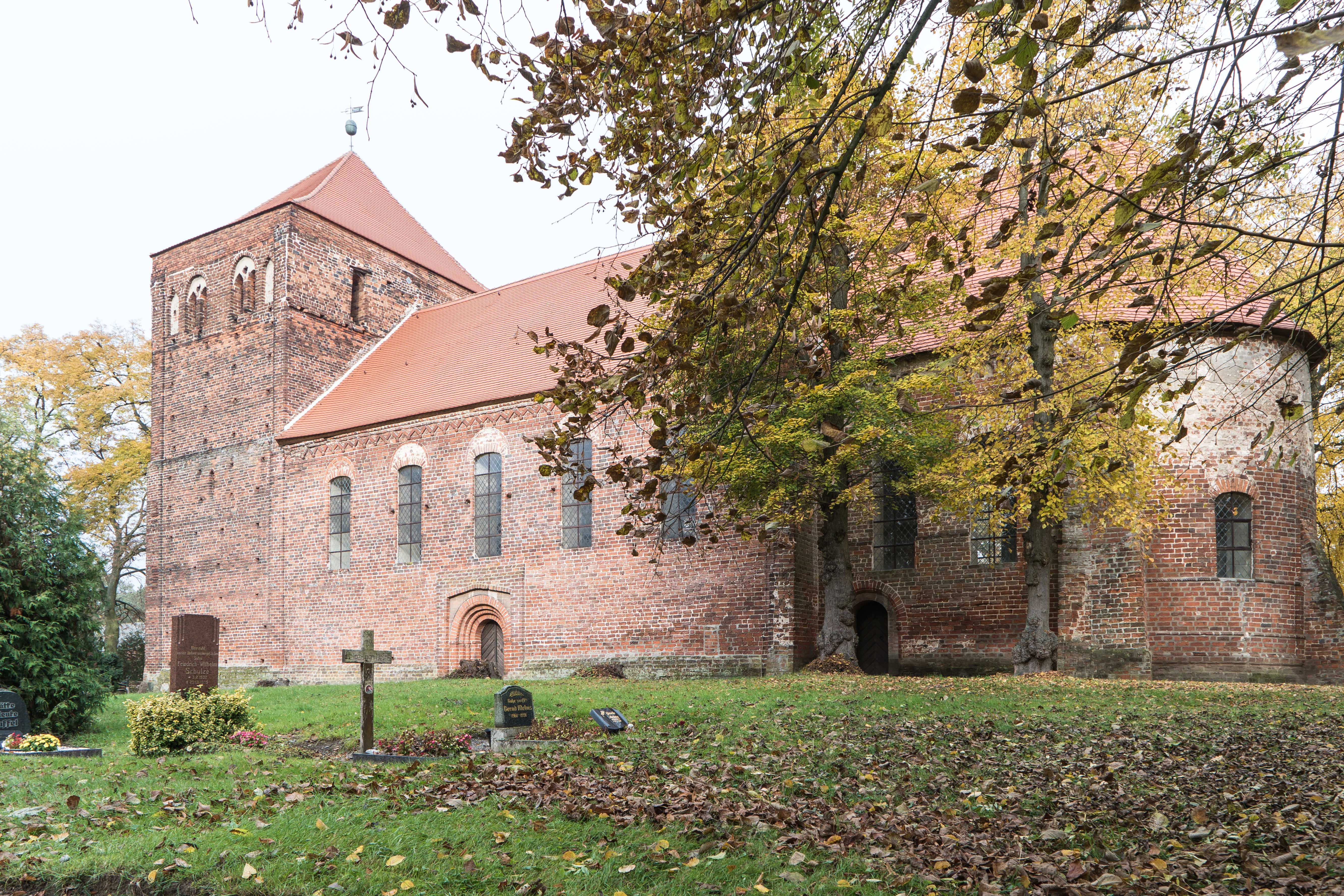 Kirche St. Nikolaus, Deichstraße in Berge OT der Hansestadt Werben (Elbe)